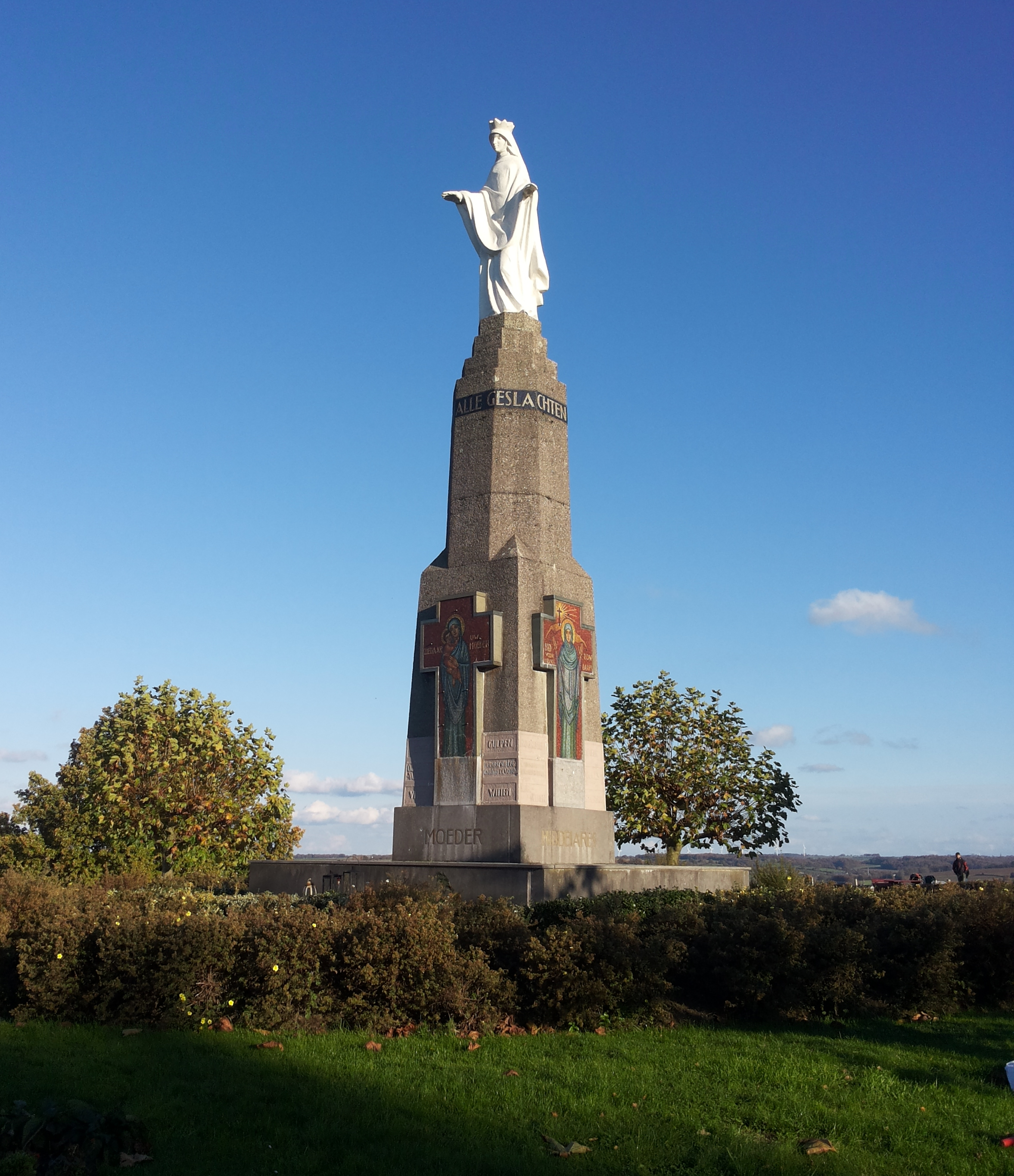 Mariabeeld op de Gulperberg, Gulpen, Gulpen-Wittem, Nederland